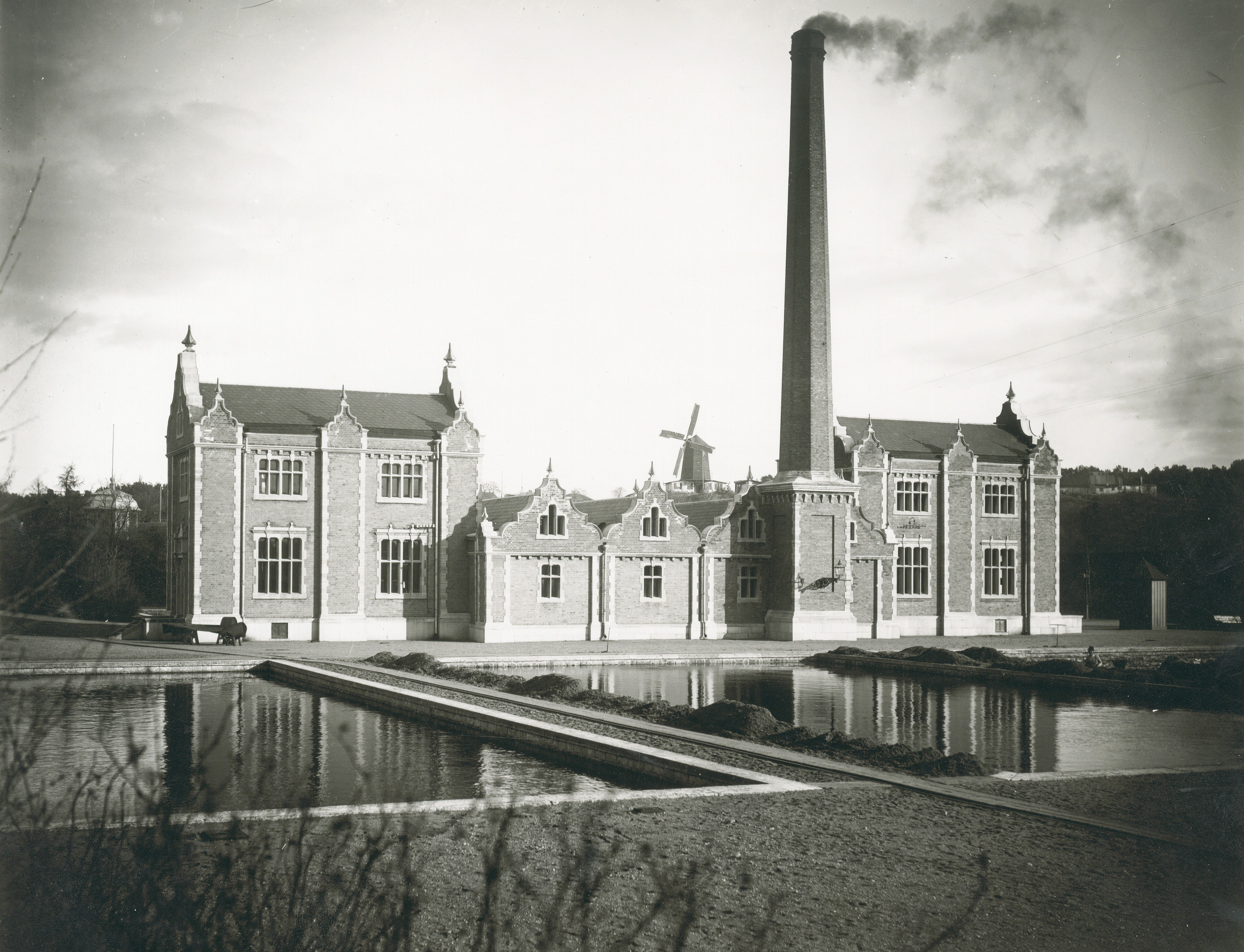 Stockholms vattenverk, Eriksdalslunden